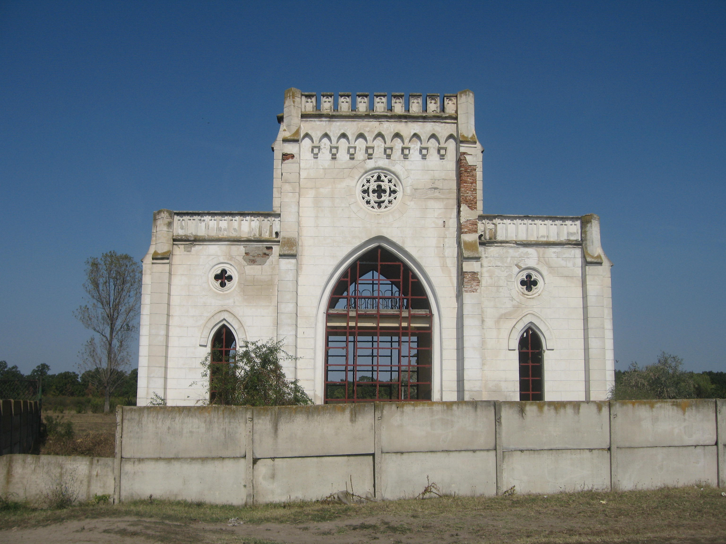 Poarta conacului poetului Costache Conachi din Ţigăneşti, jud. Galaţi